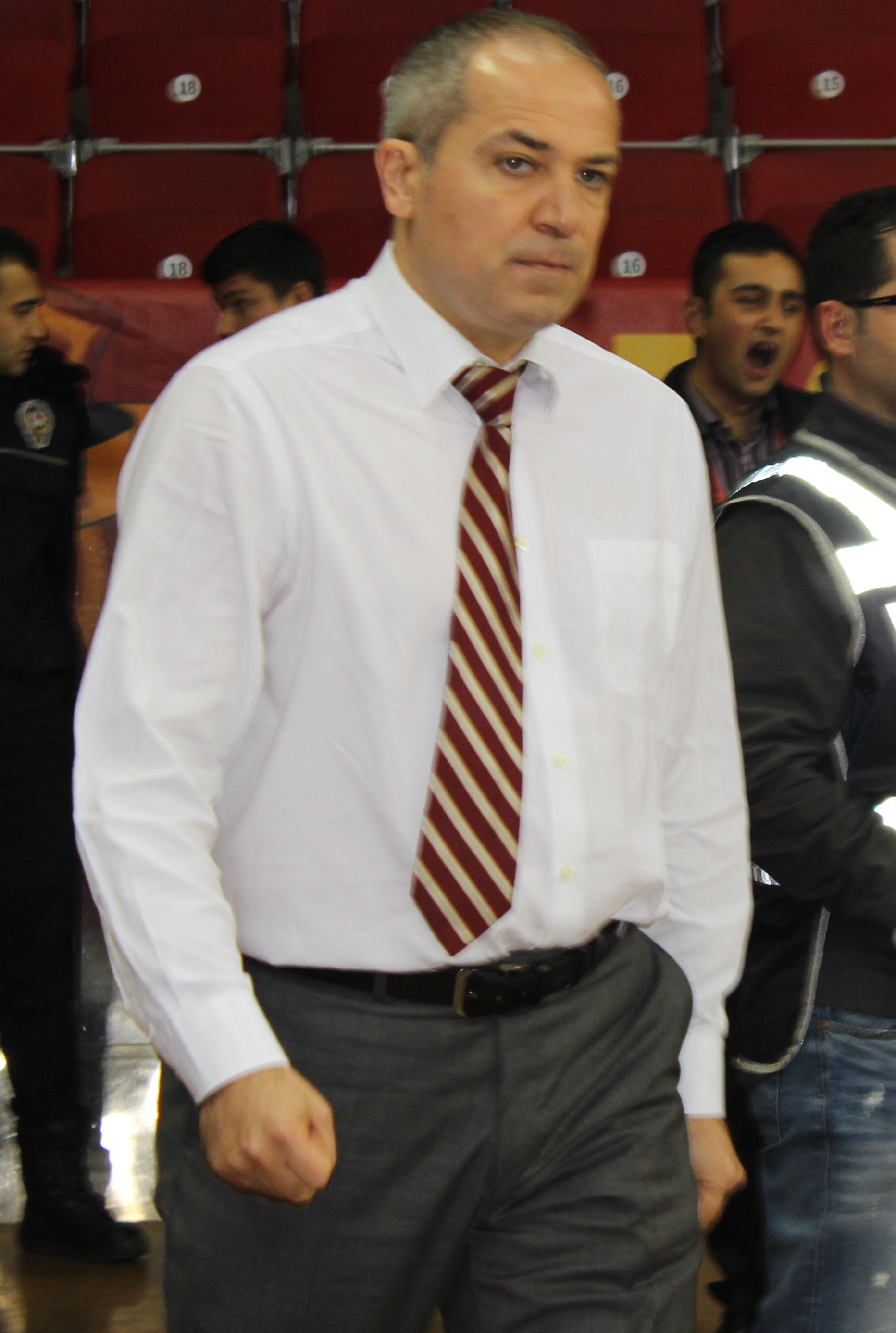 Ekrem memnun